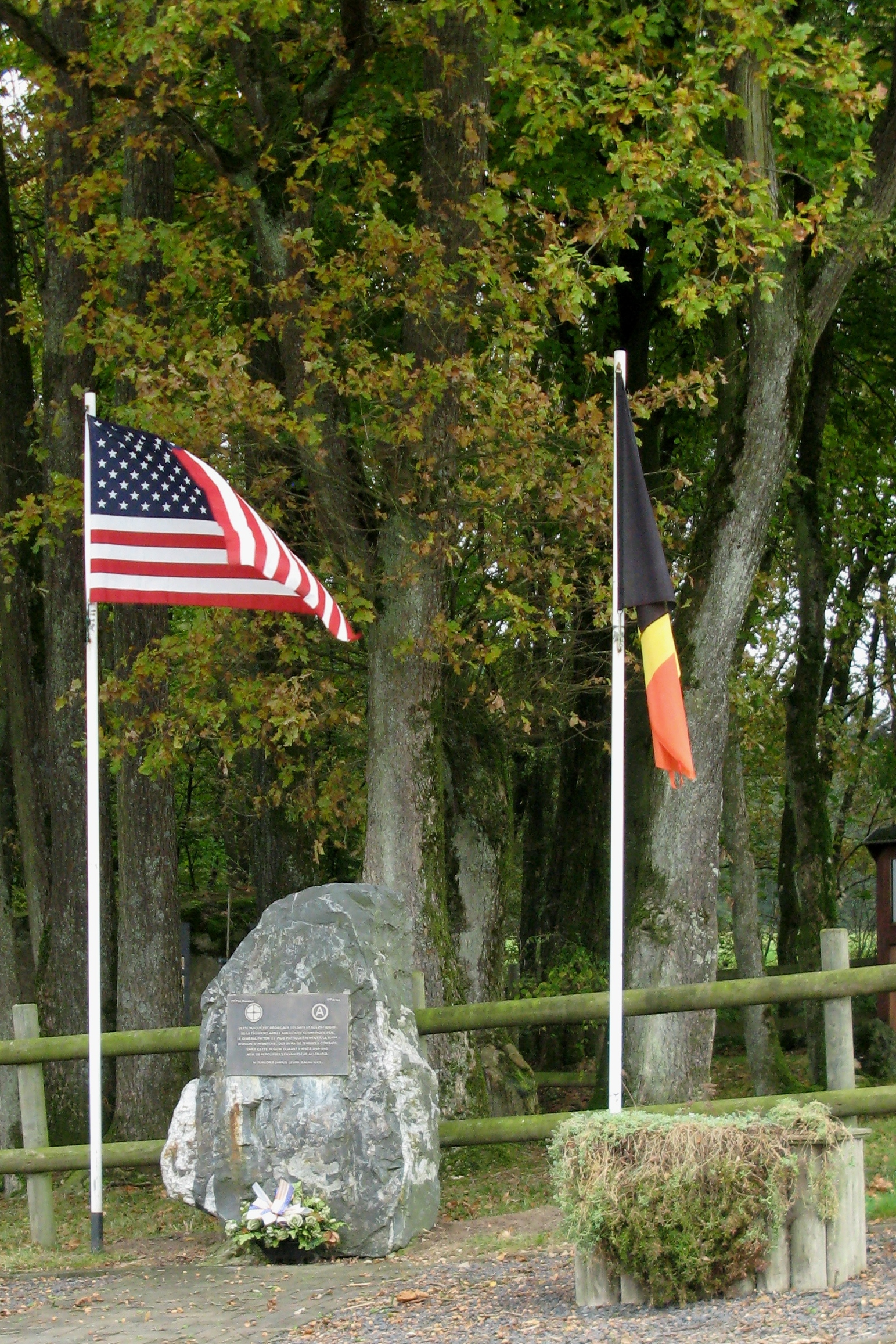 Monument vun der 35. Infantriedivisioun tëscht Lutremange a Villers-la-Bonne Eau am Oktober 2009. Kategorie:Monumenter an der Belsch